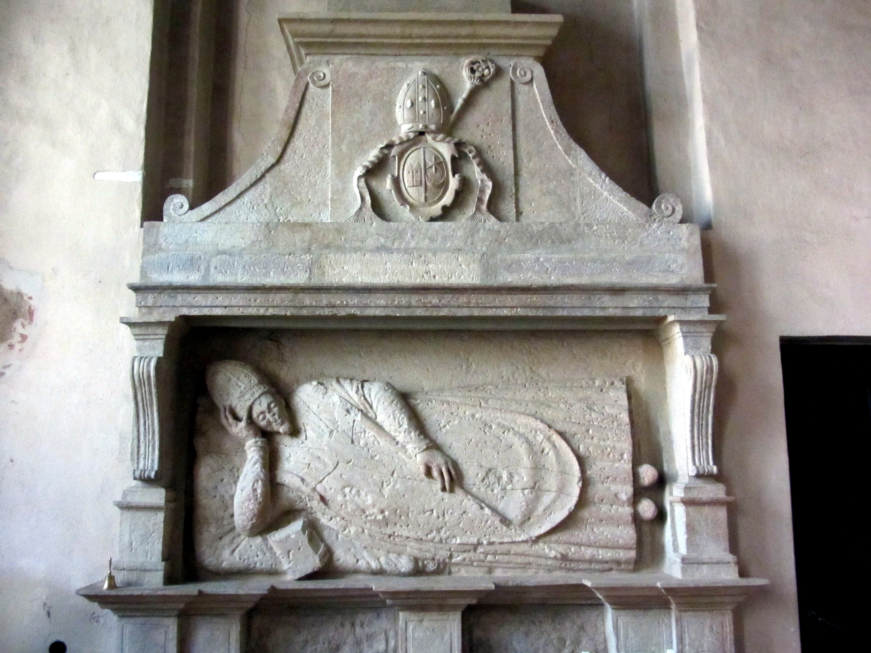 Nagrobek biskupa wendeńskiego Andrzeja Nideckiego herbu Wieże zmarłego 2 stycznia 1587 roku w Wolmarze.